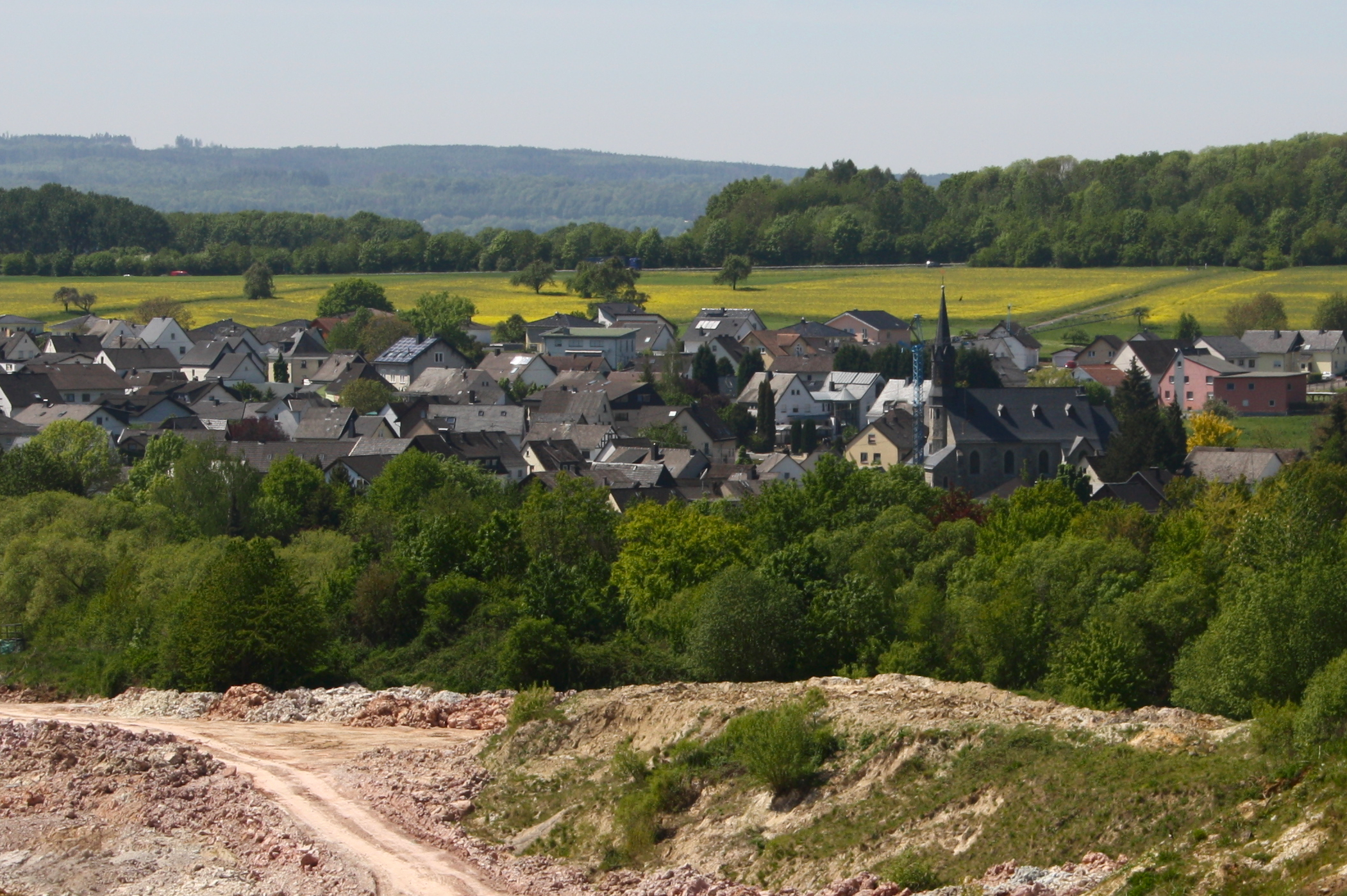 Boden, Westerwald, Rheinland-Pfalz, Deutschland